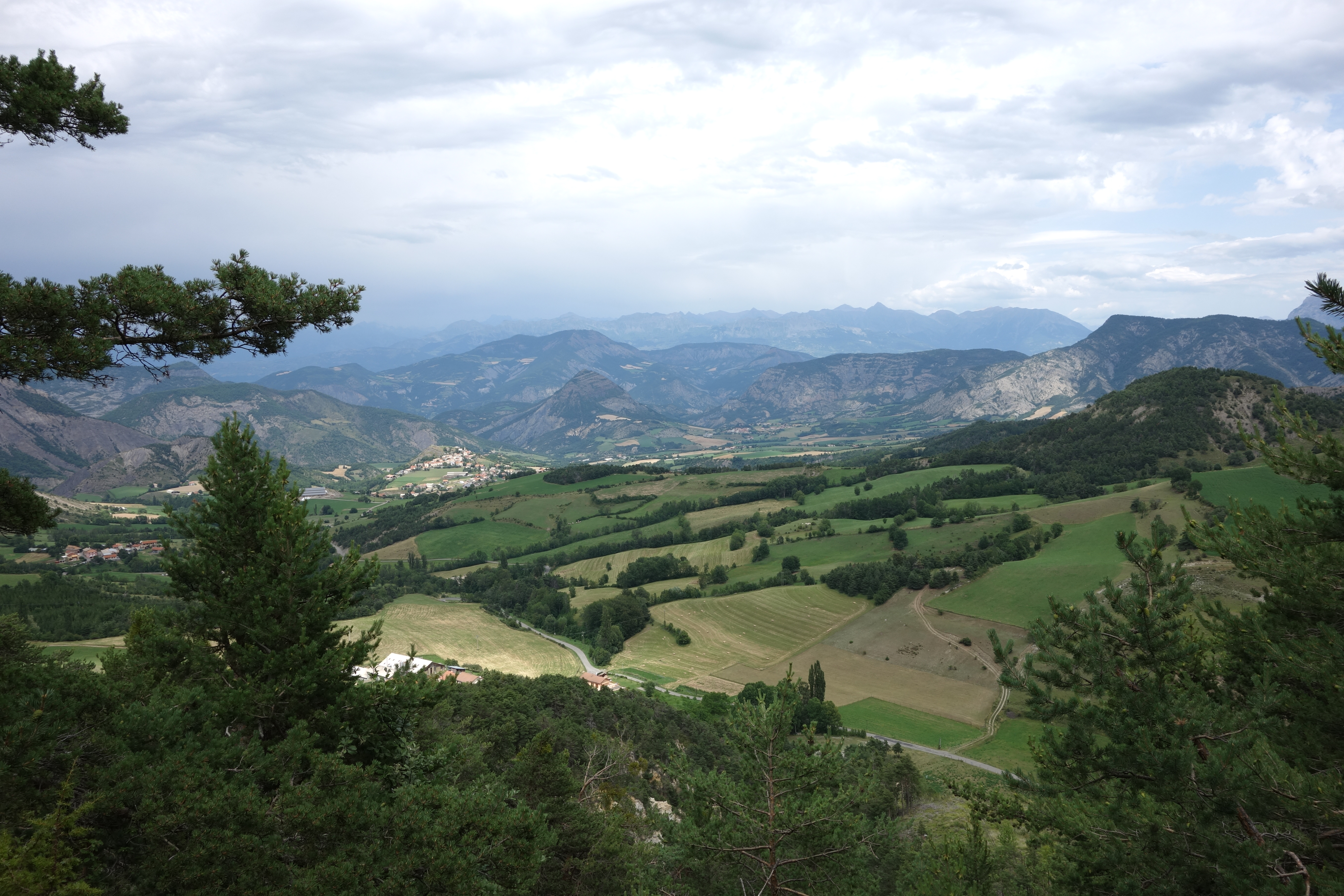 Vue du village du col des Sagnes, en limite de la commun de Bayons. On voit le col des Sagnes (départementale D1) en bas à droite.